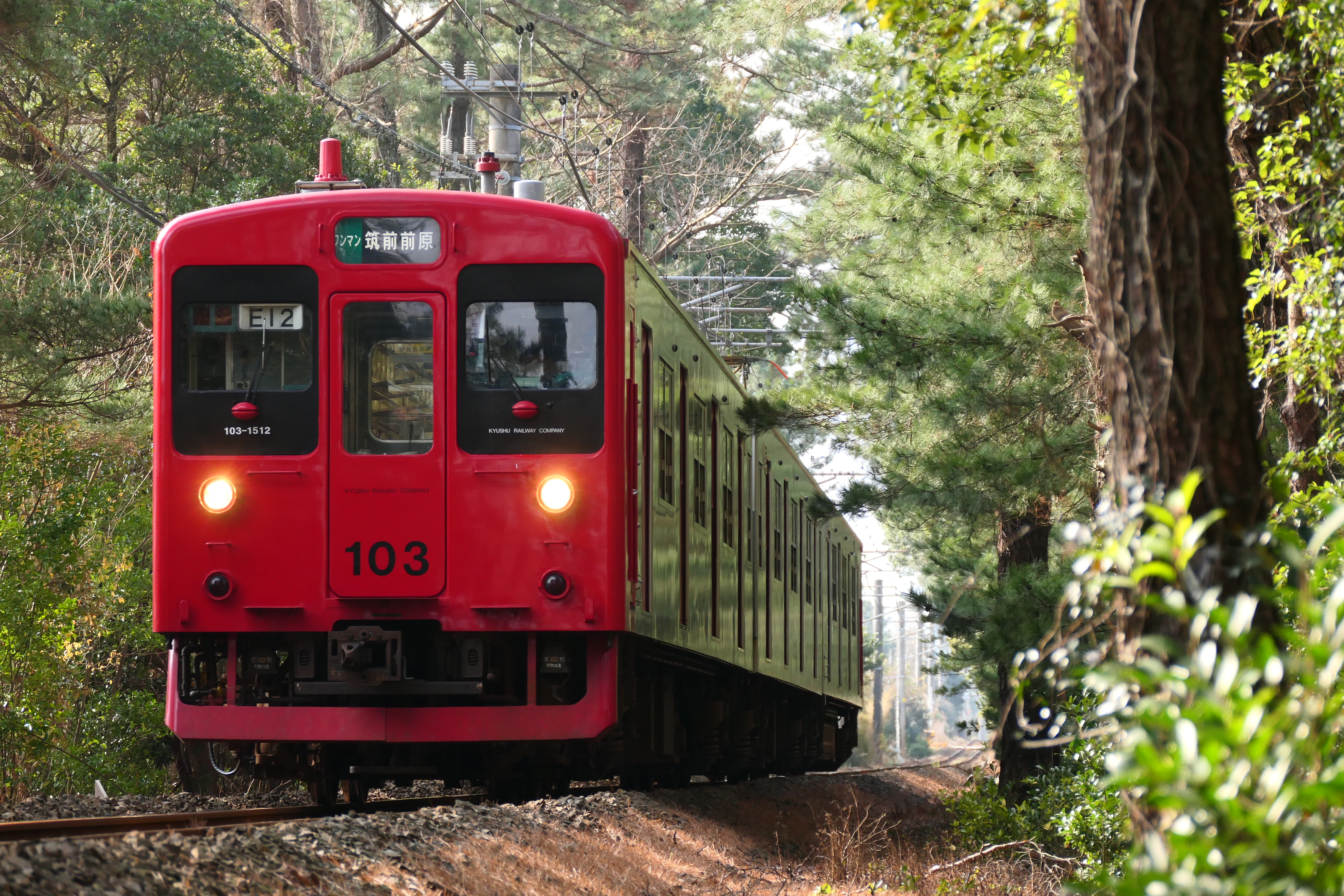 虹ノ松原を走行する筑肥線103系電車